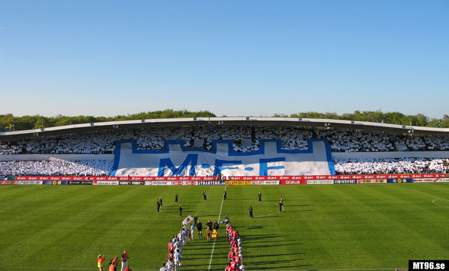 MFF supports anordnade tifo mot Helsingborg.